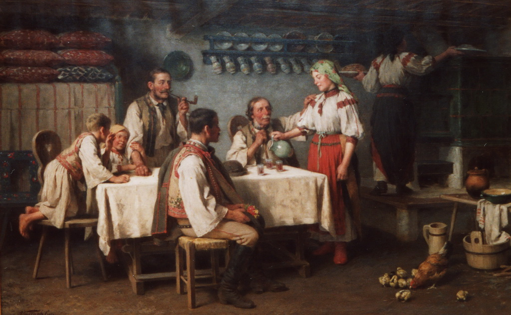 id. Vastagh György: Erzsike kézfogója